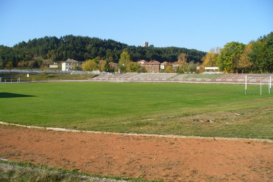 Stadium "Dimitar Lekin"